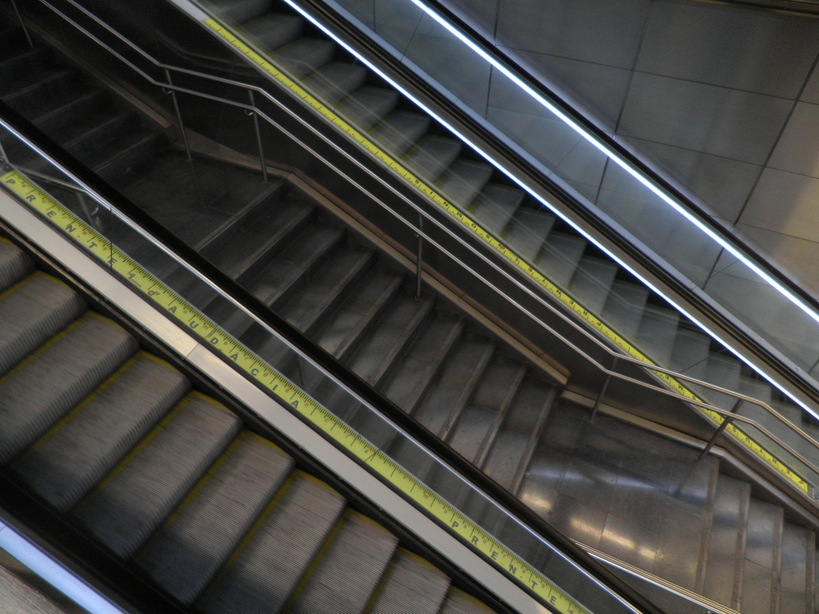 Mesures d'emergència d'Antoni Abad (Llèida 1956). Intervenció artística instal·lada l'any 2010 a la Línia 5 del Metro, estacions de Vall d'Hebron (d'on és la fotografia), Carmel i El Clot-Teixonera (Barcelona)